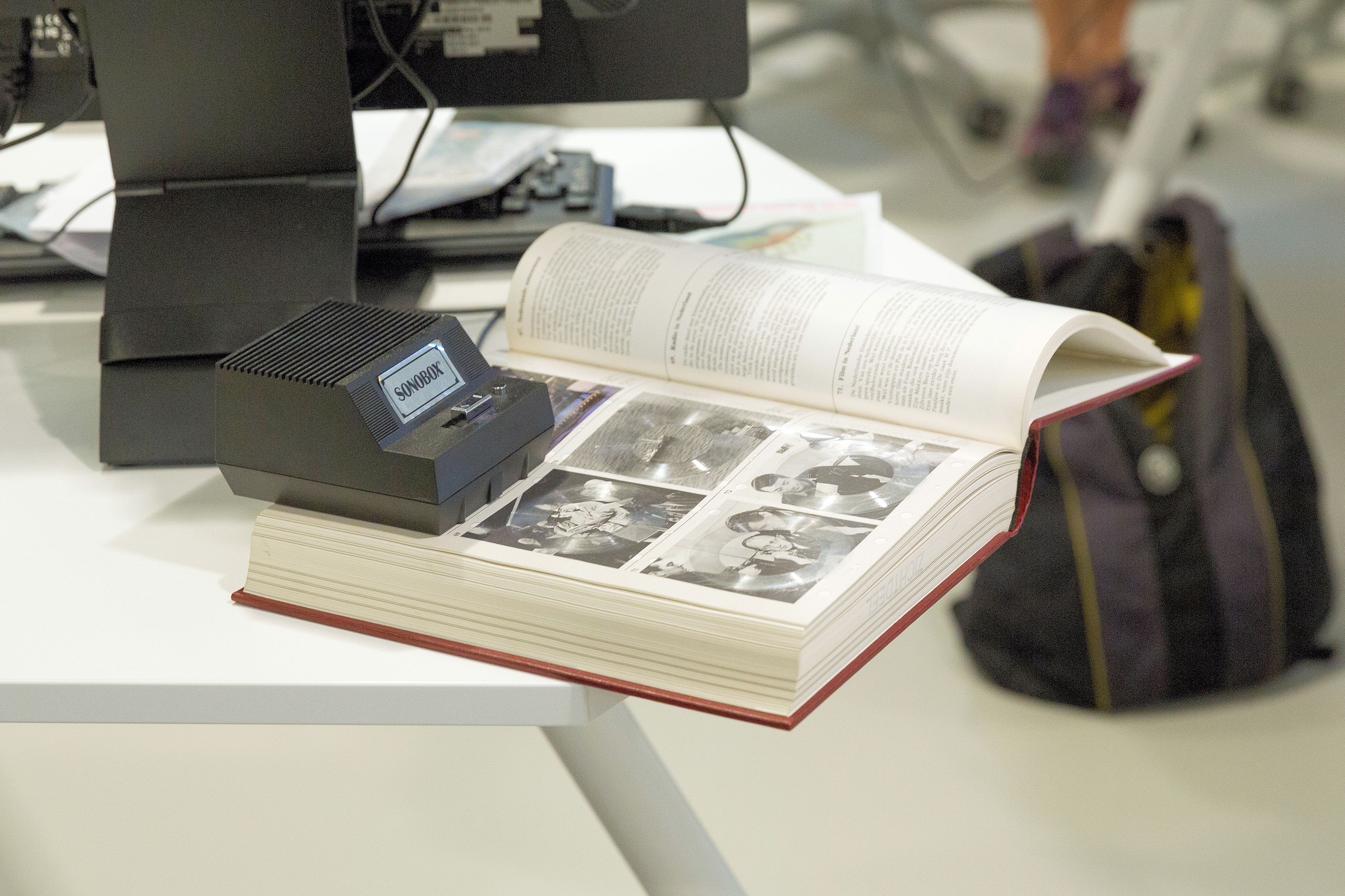 Afspilning af lyd i en bog